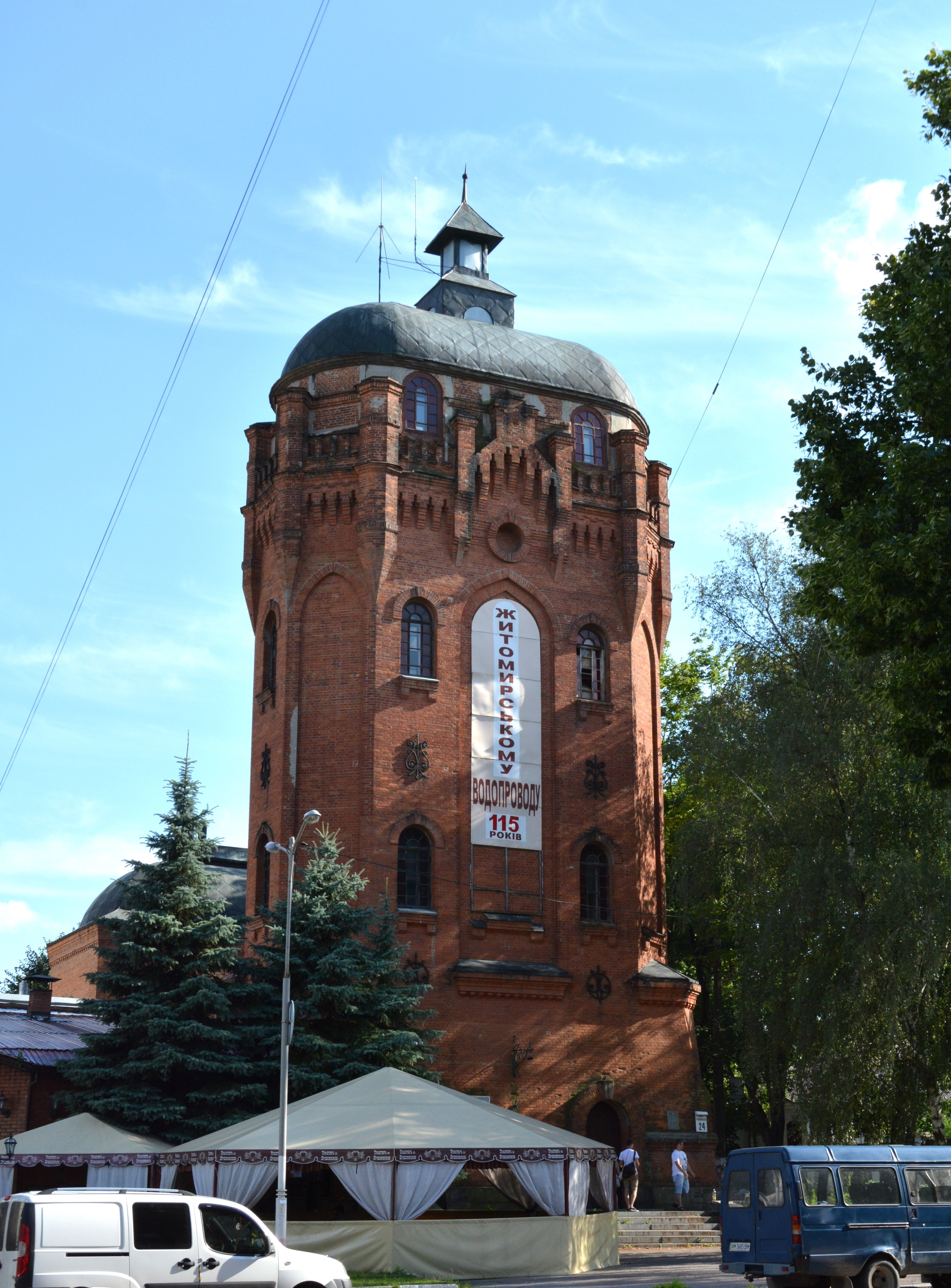 Водонапірна башта, Житомир, вул. Пушкінська, 24